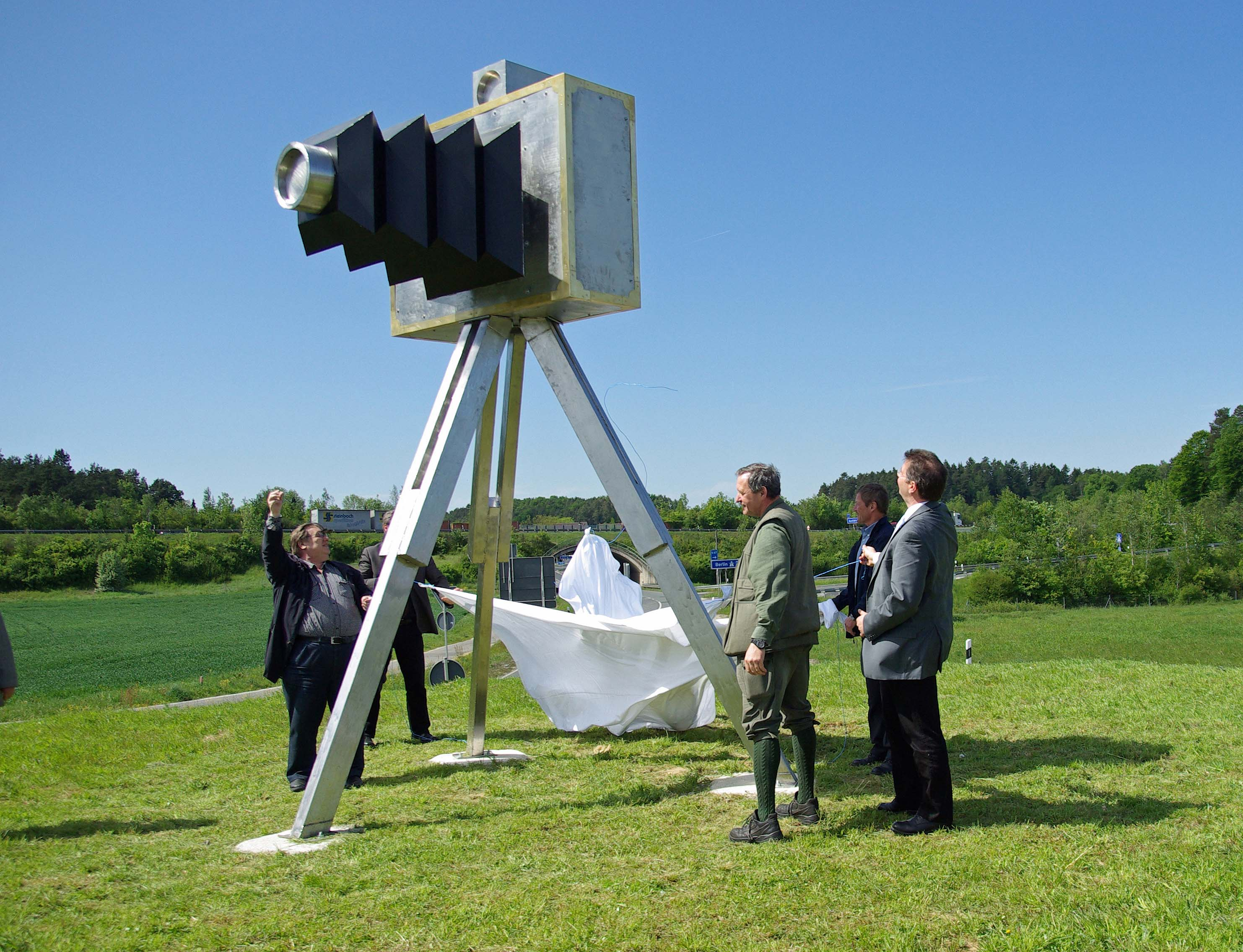 Dt_Kameramuseum_Plech_Abstrahierter_Fotoapparat_als_Blickfang_am_Ortseingang